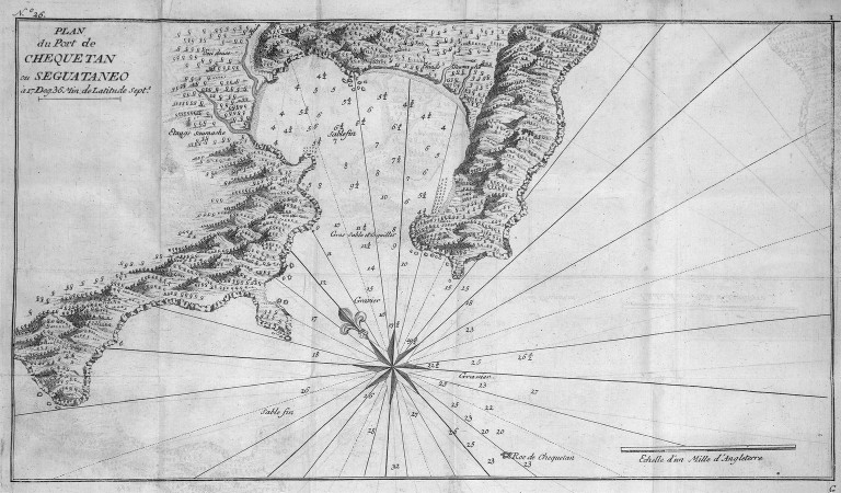 [Illustrations de Voyage autour du monde] Auteur : George Anson Éditeur : Henri-Albert Gosse et Compagnie (Genève) 1750